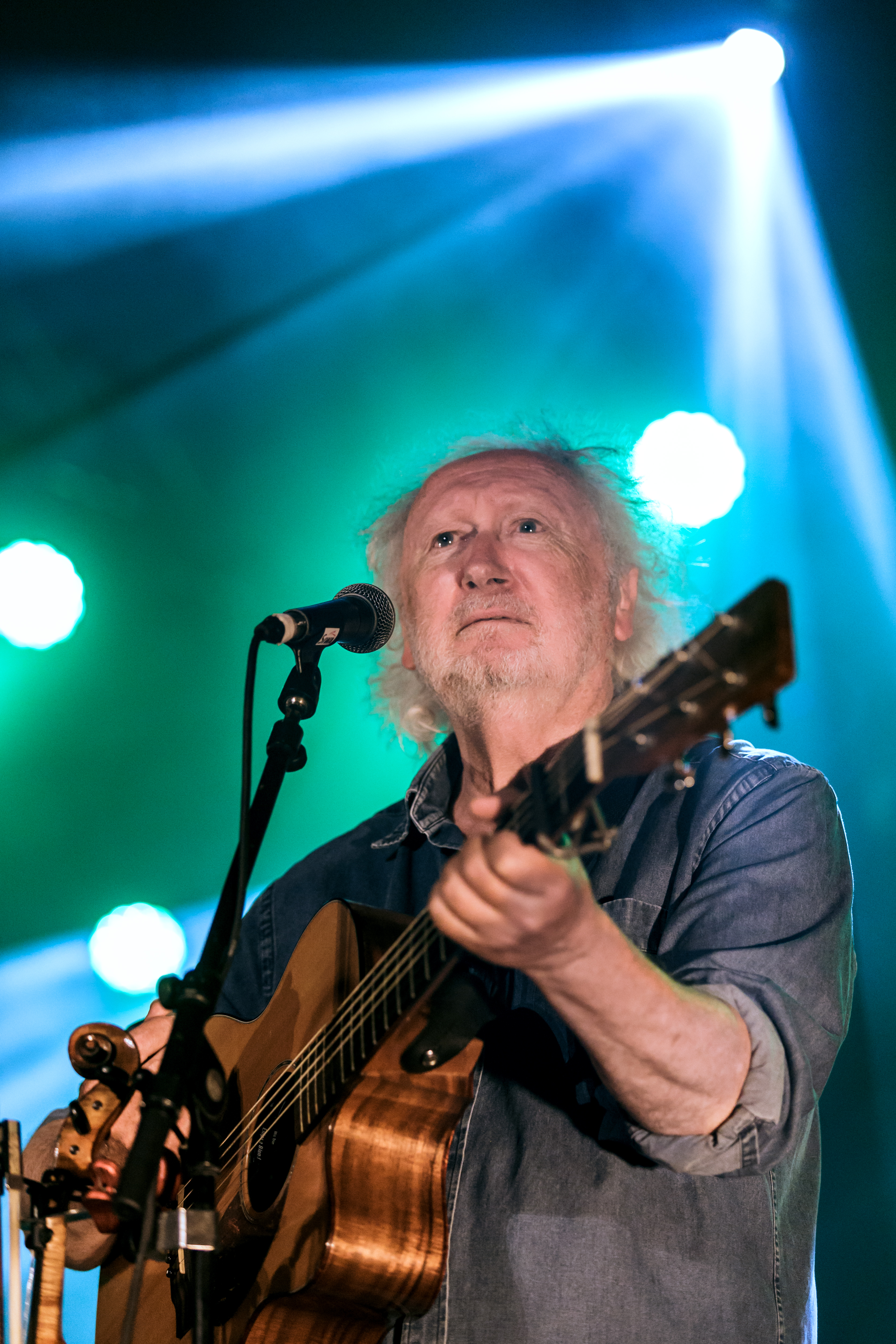 Melaine Favennec avec le Trio EDF en concert au festival de Cornouaille à Quimper le 23 juillet 2016.